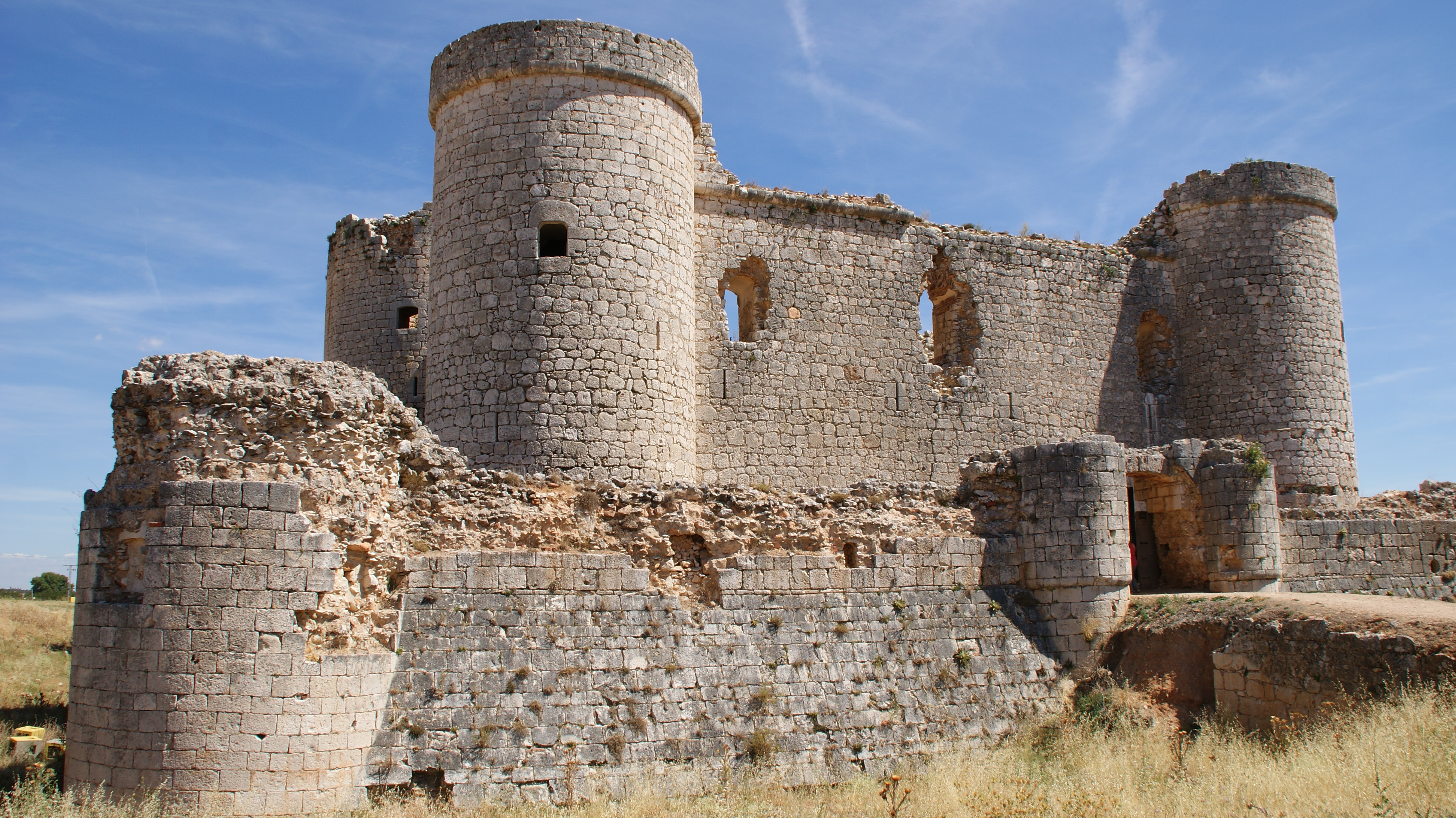 Fortaleza palaciega de finales del siglo XV